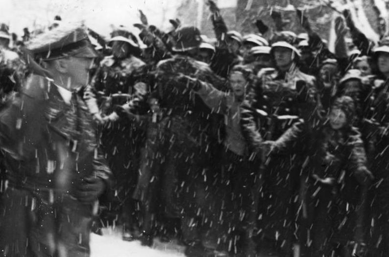 Der Führer auf dem Weg zur Eröffnungsfeier